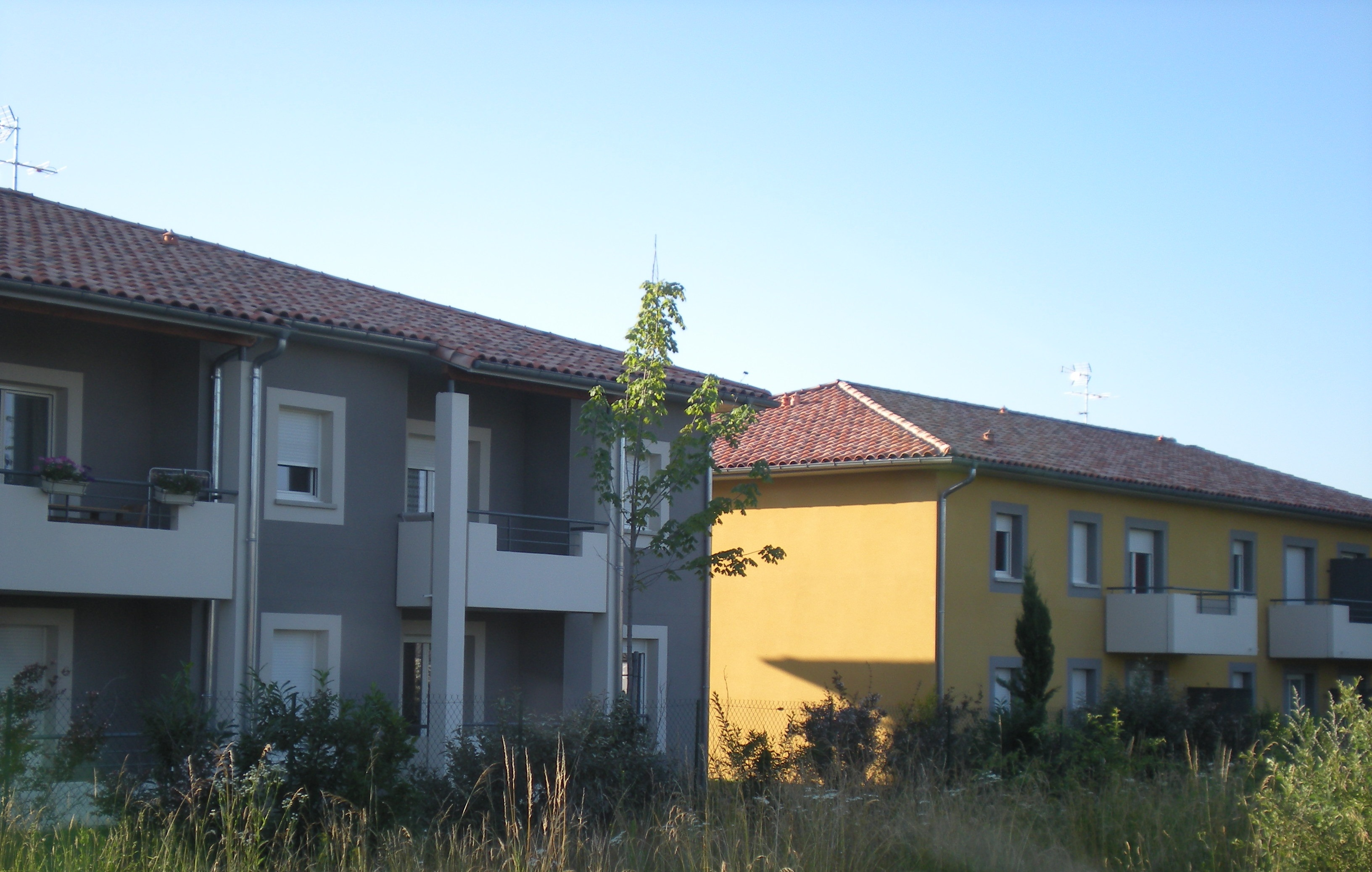 Nouvelle résidence à Lannemezan, près de la gare